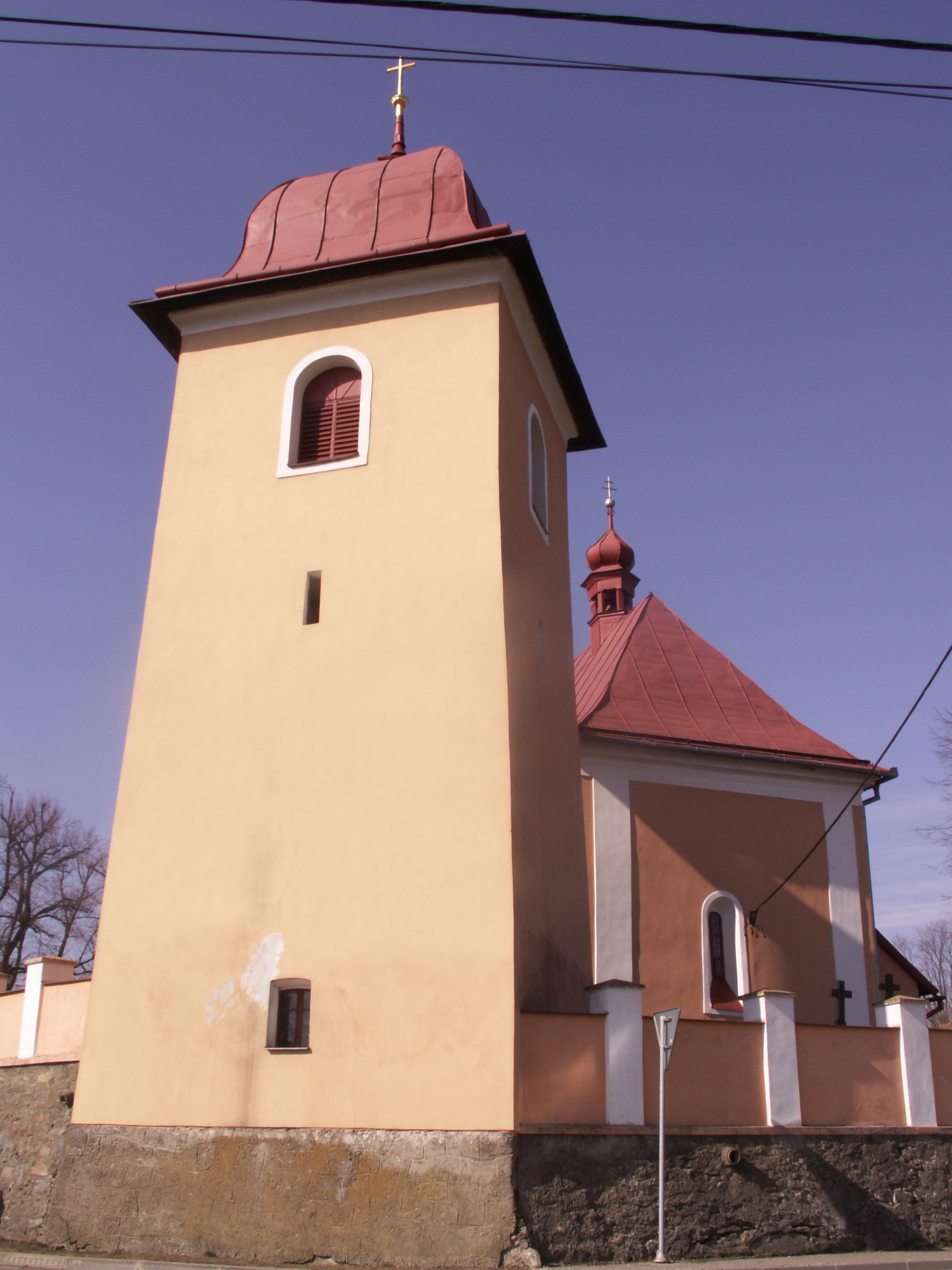 kostel sv. Jakuba a Filipa v Pavlově, okres Žďár nad Sázavou, kraj Vysočina